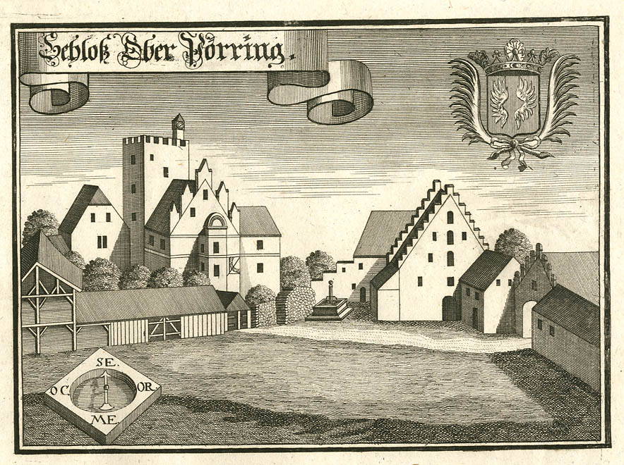 “Schloß Ober Pörring”, aus : Beschreibung des Churfürsten- u. Hertzogthumbs Ober- und Nidern Bayrn. Rentamt Landshut. – Gericht Landau, 1723